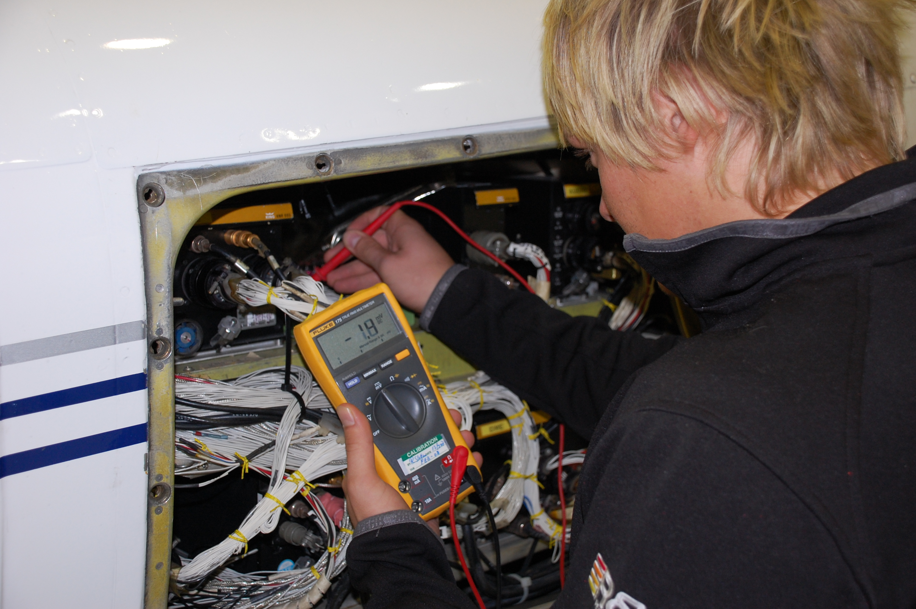 En elev, som holder på med sin avionikerutdannelse, måler på en Piper Cheyenne med et kalibrert multimeter.